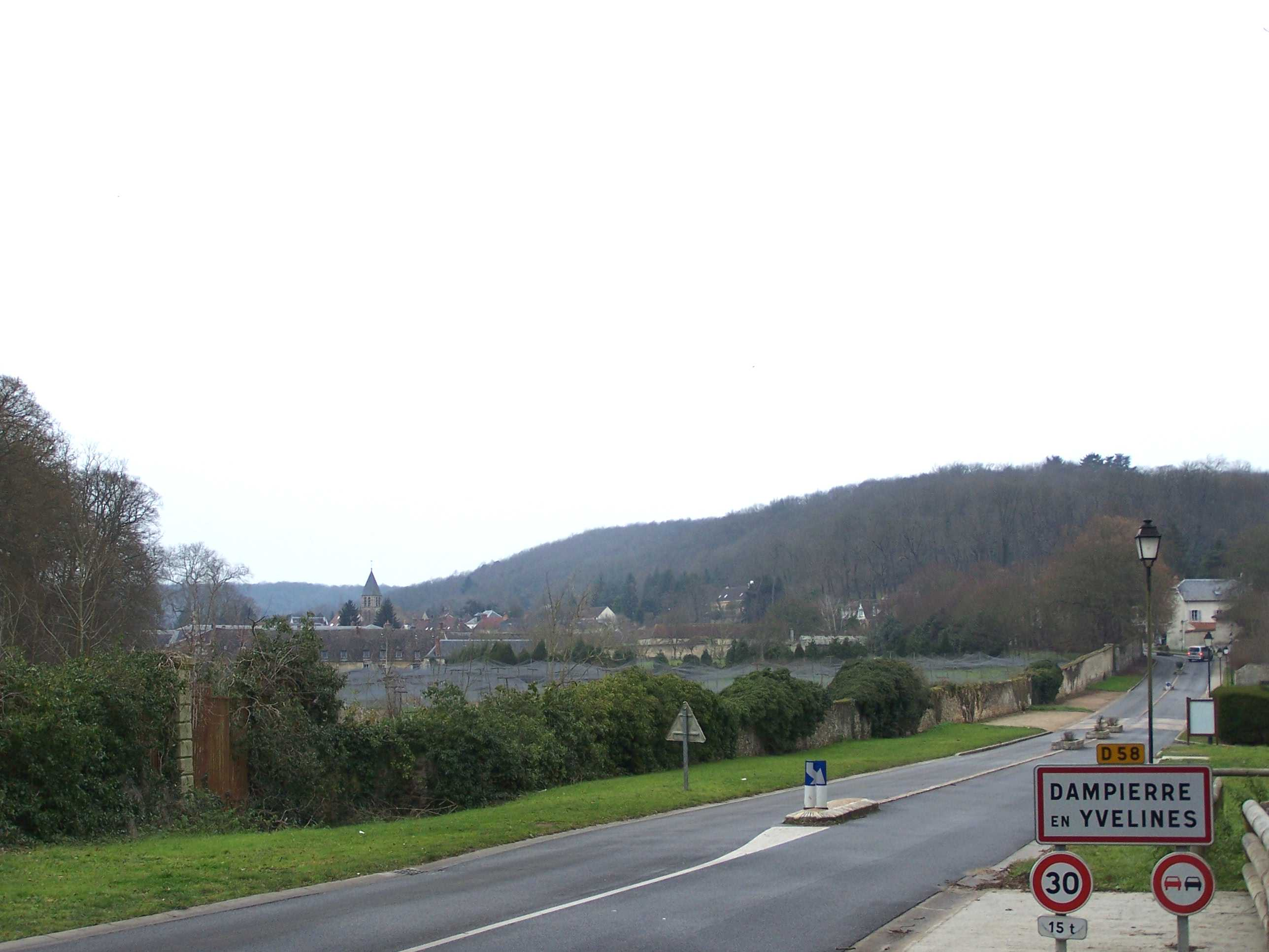 Vue de l'entrée de Dampierre-en-Yvelines (Yvelines, France) depuis la route départementale 58